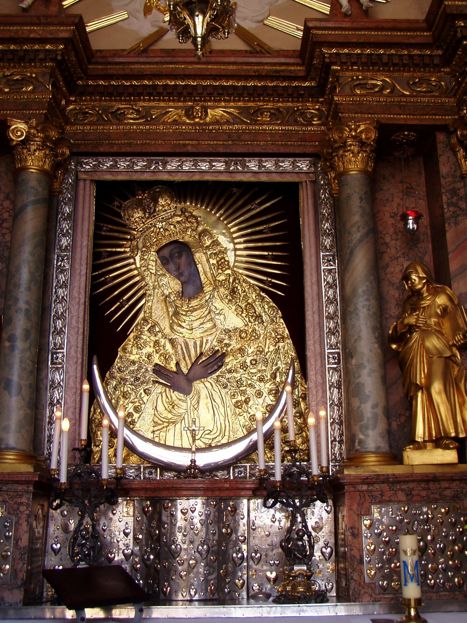 Matka Boska Ostrobramska